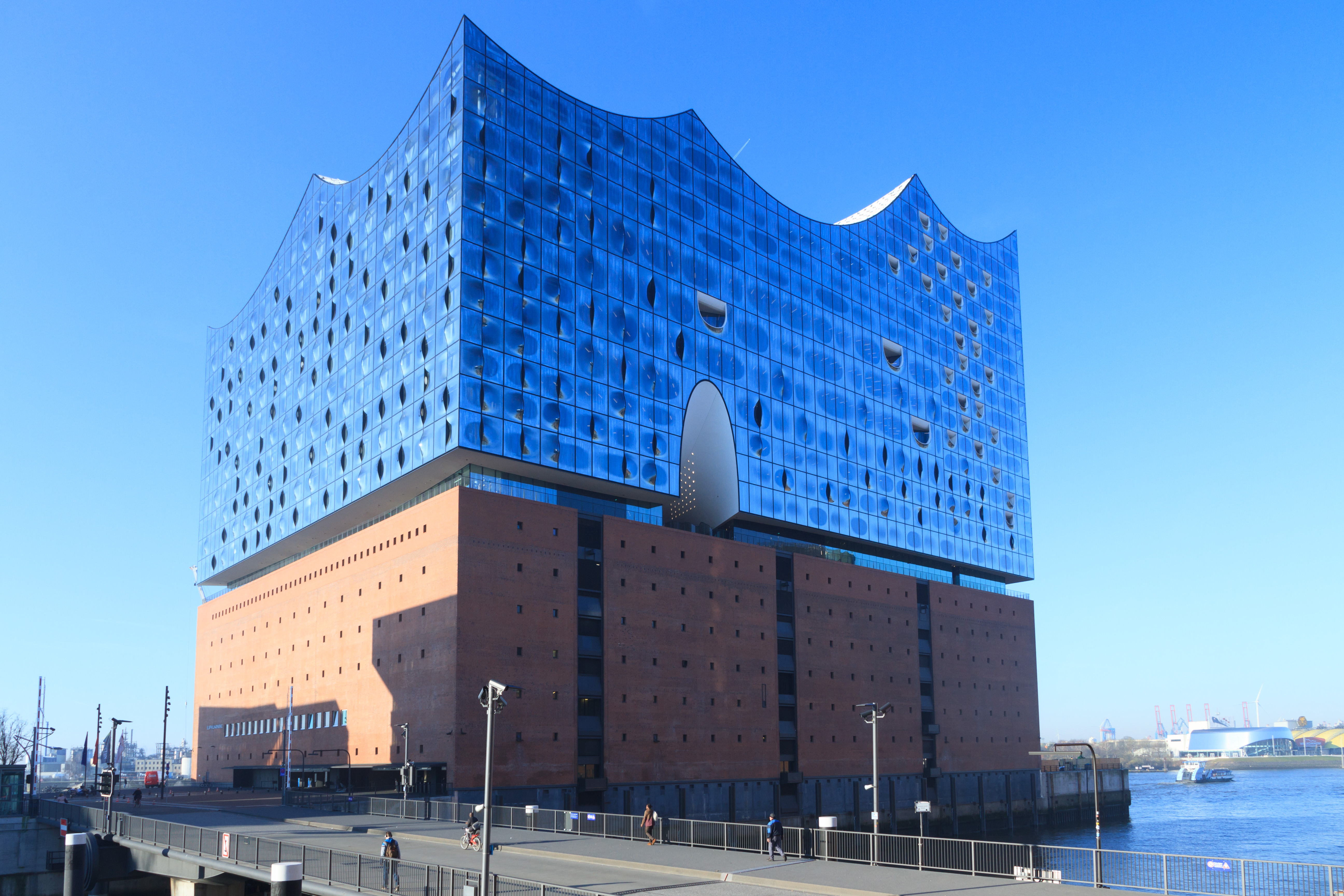 Elbphilharmonie